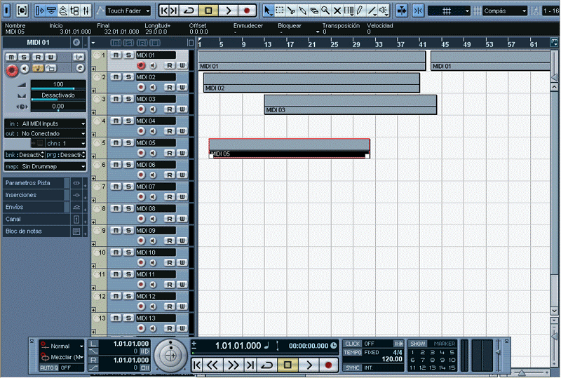 Sección general de un secuenciador musical (software)